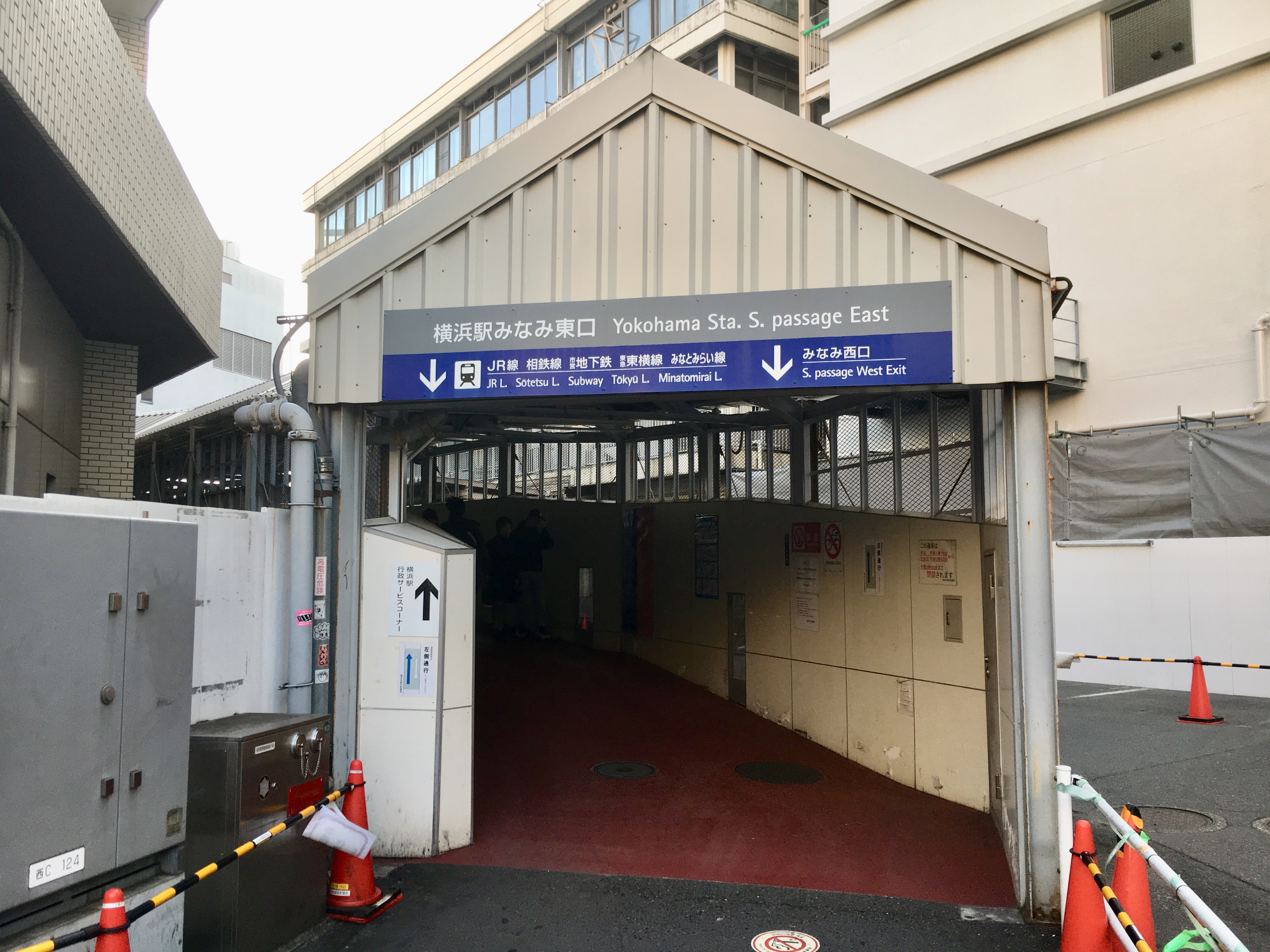 横浜駅みなみ東口の暫定通路出入口。なお、途中には横浜中央郵便局別館跡に2019年3月オープンしたエンターテイメント施設「アソビル」の入口がある（※同施設も横浜駅東口の再開発が本格化するまでの暫定施設という扱い）。